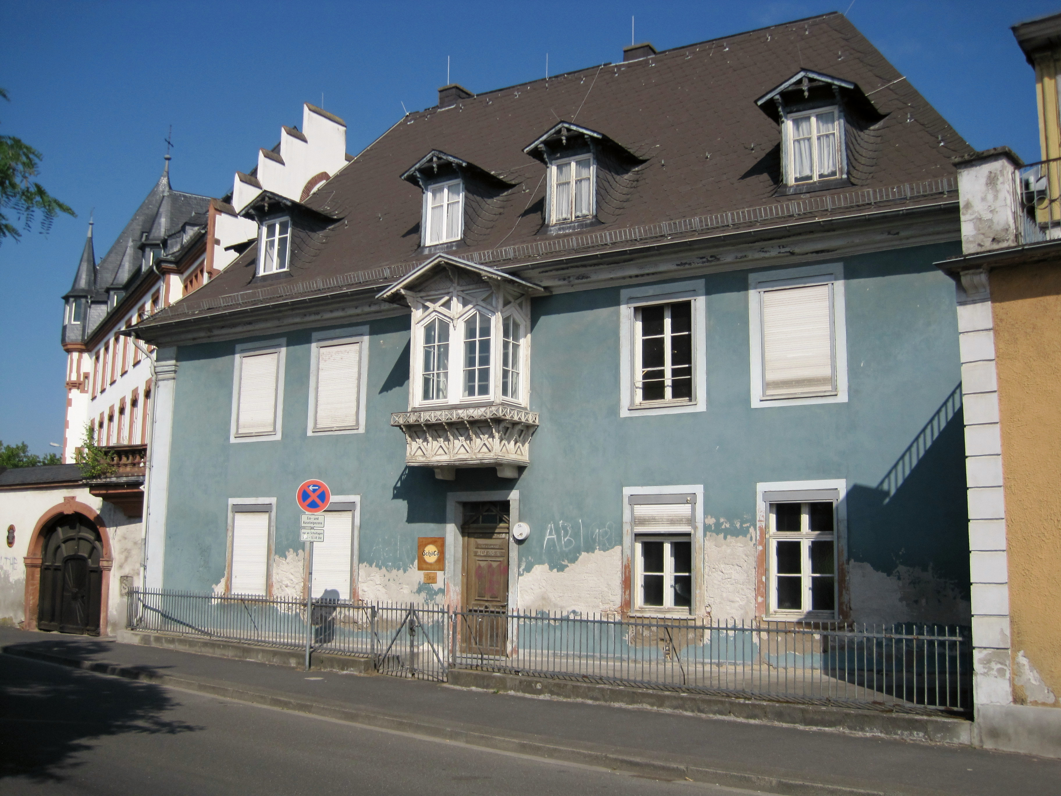 Eberbacher Hof, Rüdesheimer Straße 32, Geisenheim am Rhein. Wappenstein des Eberbacher Abtes Michael Schnock über Toreinfahrt mit 1705 bezeichnet. Elternhaus des Architekten Philipp Hoffmann. Seit 1969 Teil der St. Ursula-Schule